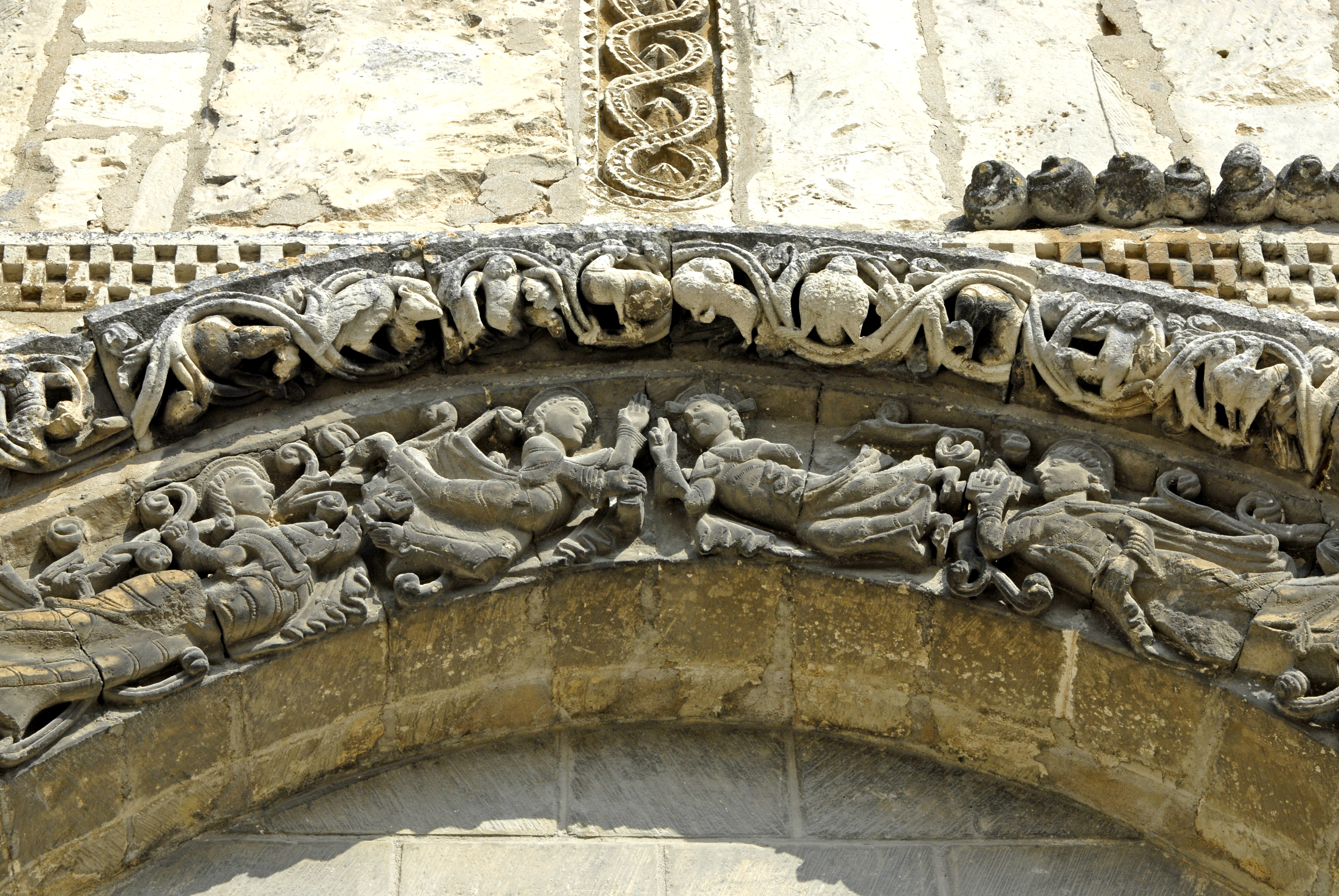 Abbaye aux Dames Saintes, Abteikirche, Archivolte linkes Scheinportal